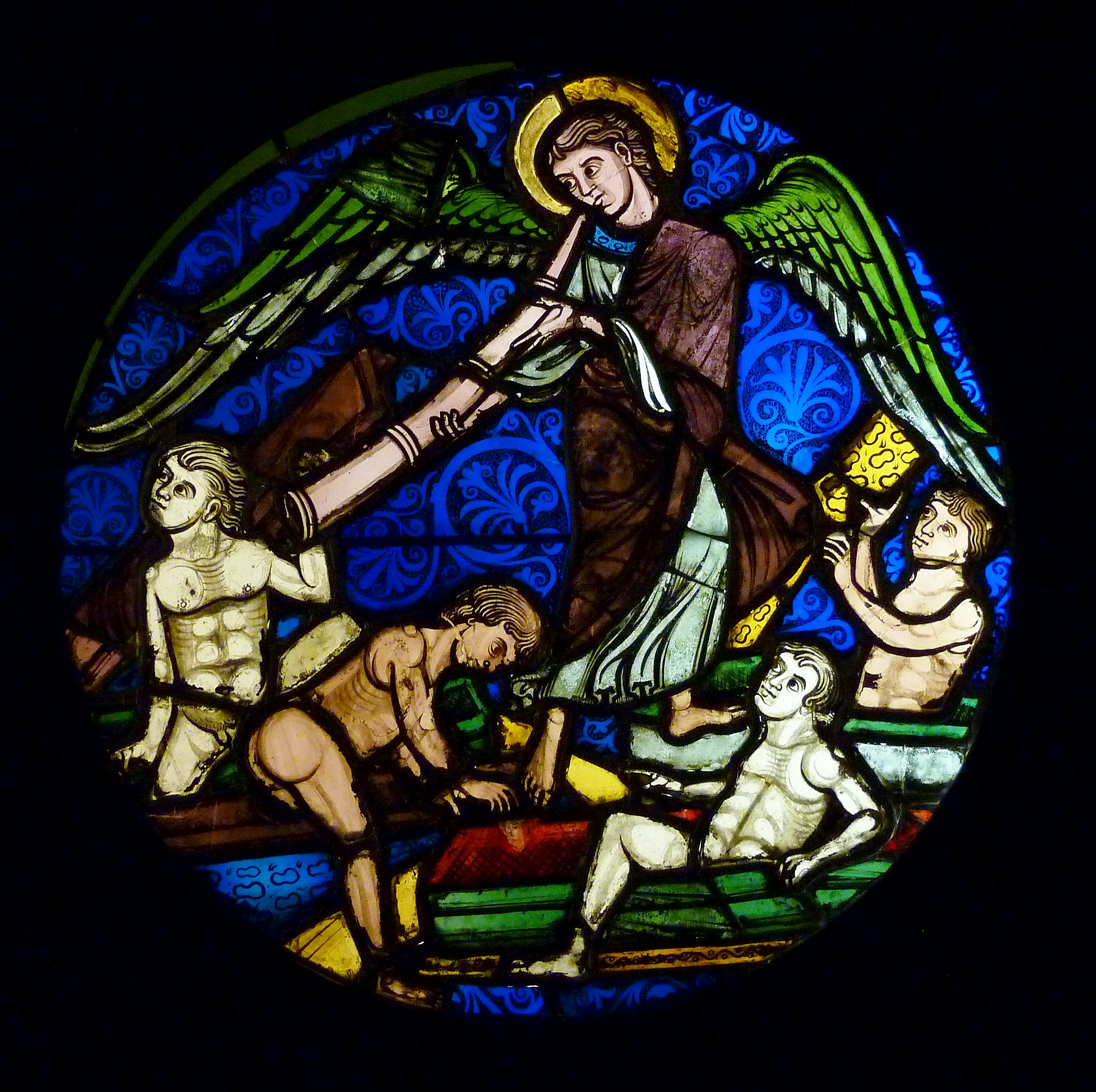 Bleiglasfenster im Musée National du Moyen Âge (Hôtel de Cluny) in Paris; Herkunft: Sainte-Chapelle in Paris, um 1200; Darstellung: Auferstehung der Toten